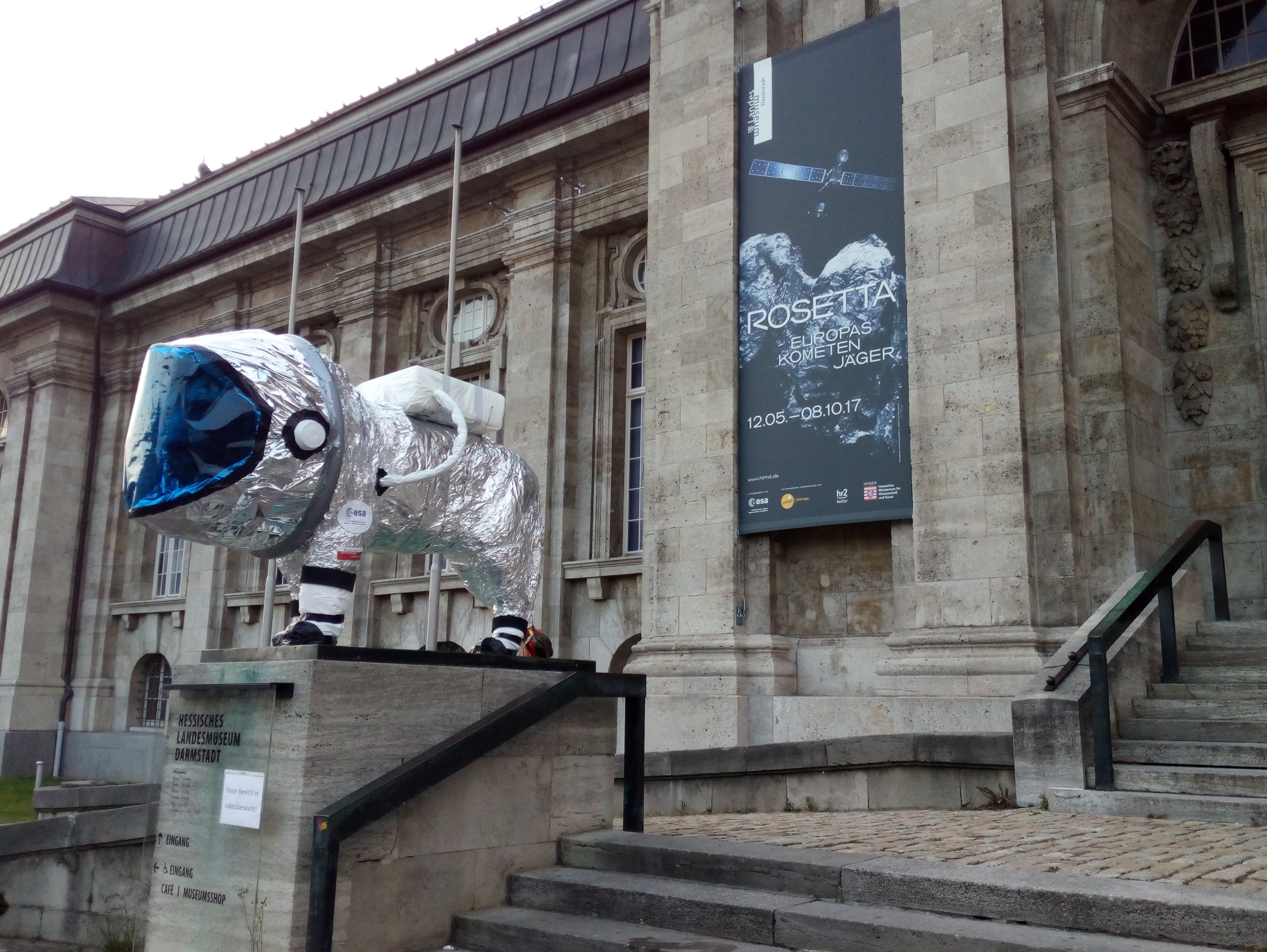 Rosetta, Europas Kometenjäger, Löwenskulptur eingekleidet in Raumanzug, Hessisches Landesmuseum Darmstadt